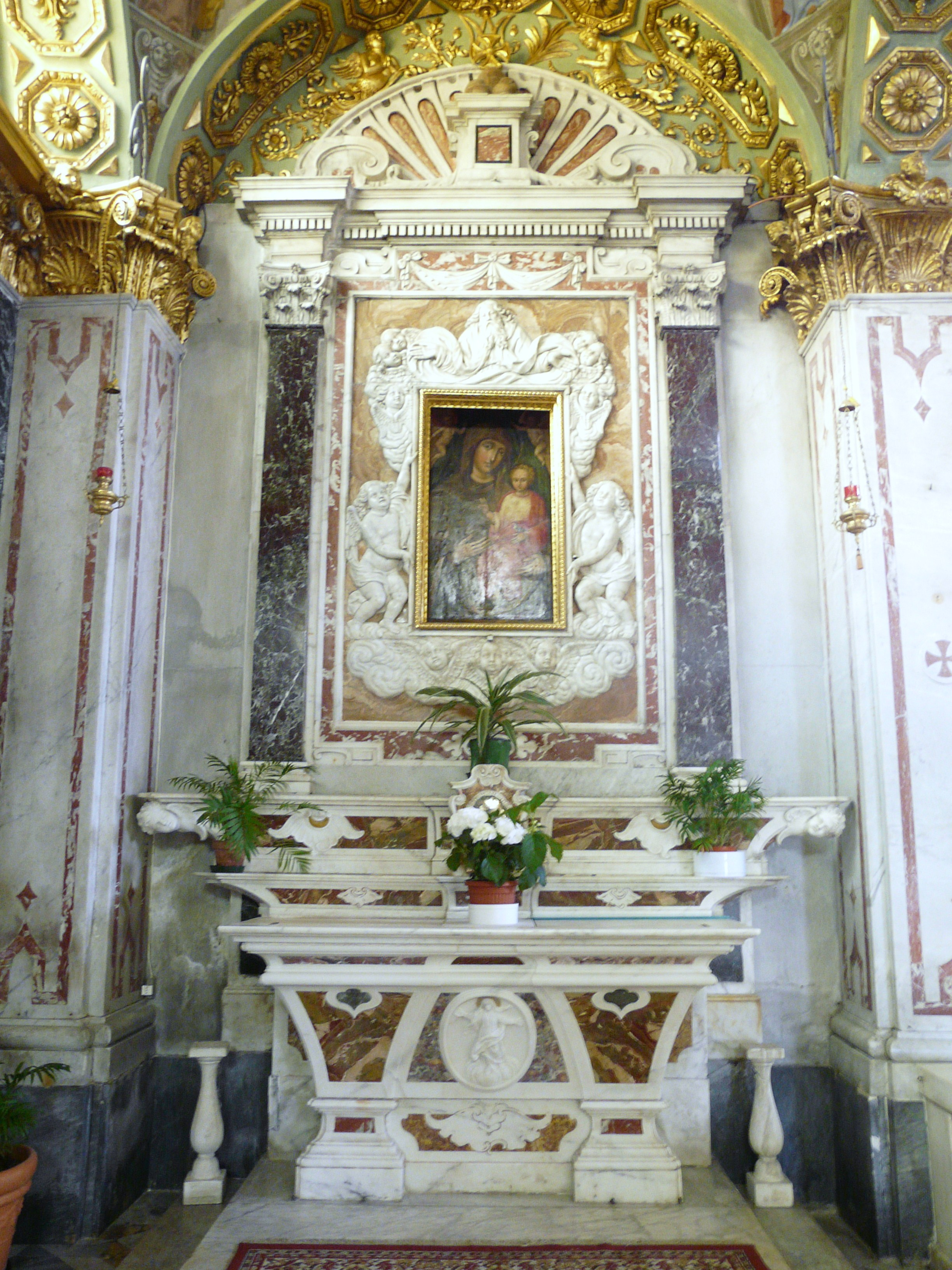 Altare della Madonna delle Grazie, con omonimo dipinto bizantino, del Santuario di Nostra Signora delle Grazie di Megli, Recco, Liguria, Italia